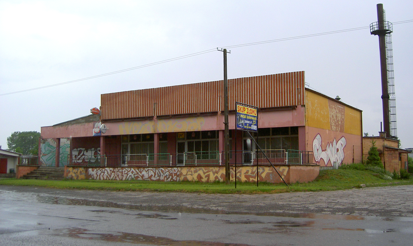 Ulhówek, Poland • Restauracja Kresowa / Kresowa Restaurant